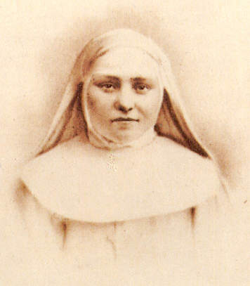 Picture of Sister Amandina van Schakkebroek